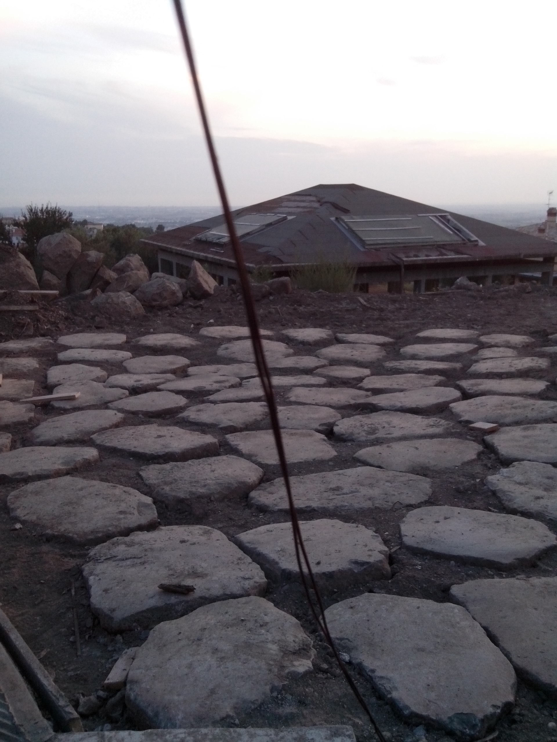 Diverticolo per la villa di Domiziano tra Castel Gandolfo e Albano (luglio 2013)